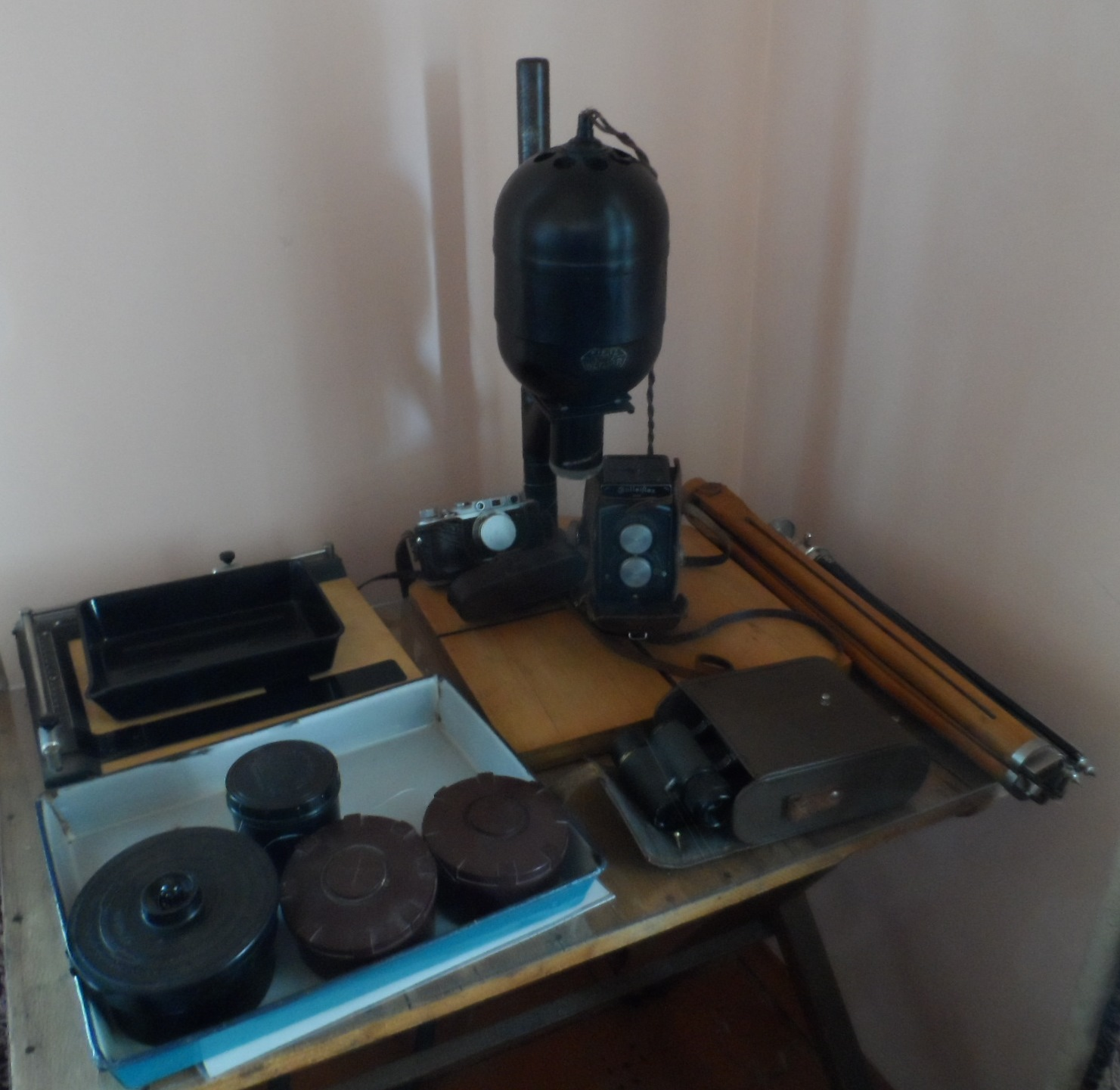 Принадлежности домашней фотолаборатории Пришвина в его рабочей комнате в Дунино